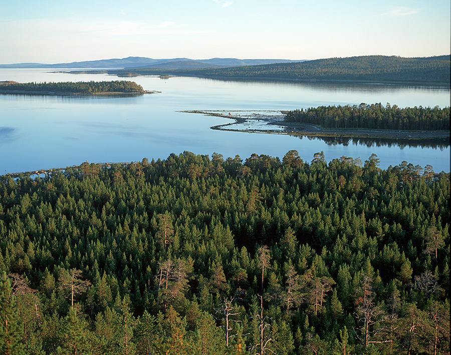 Кандалакшский заповедник. Острова в Белом море.